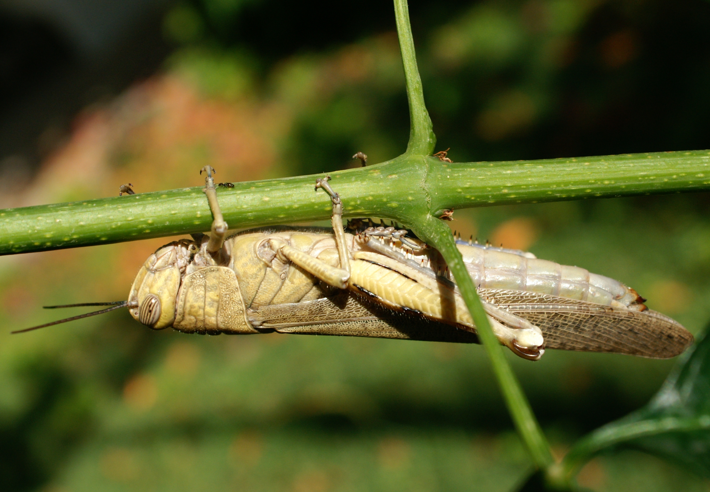 Wüstenheuschrecke